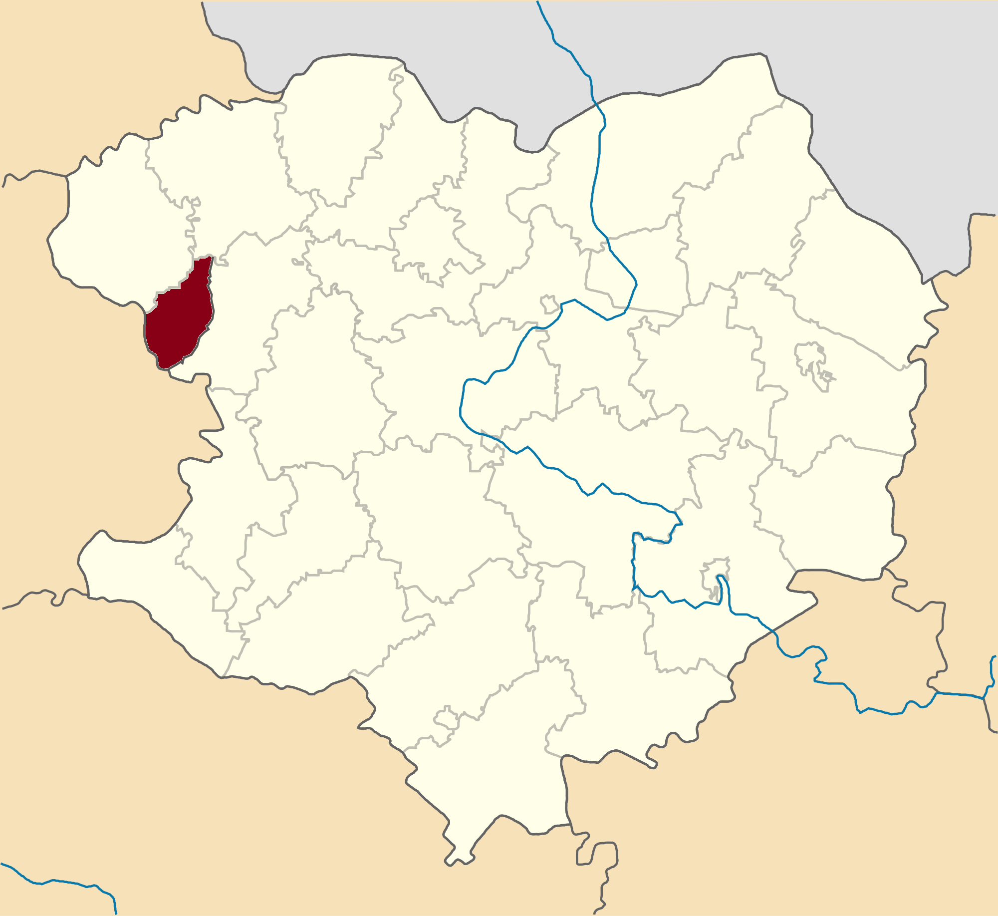 Kolomatskyi-Raion map